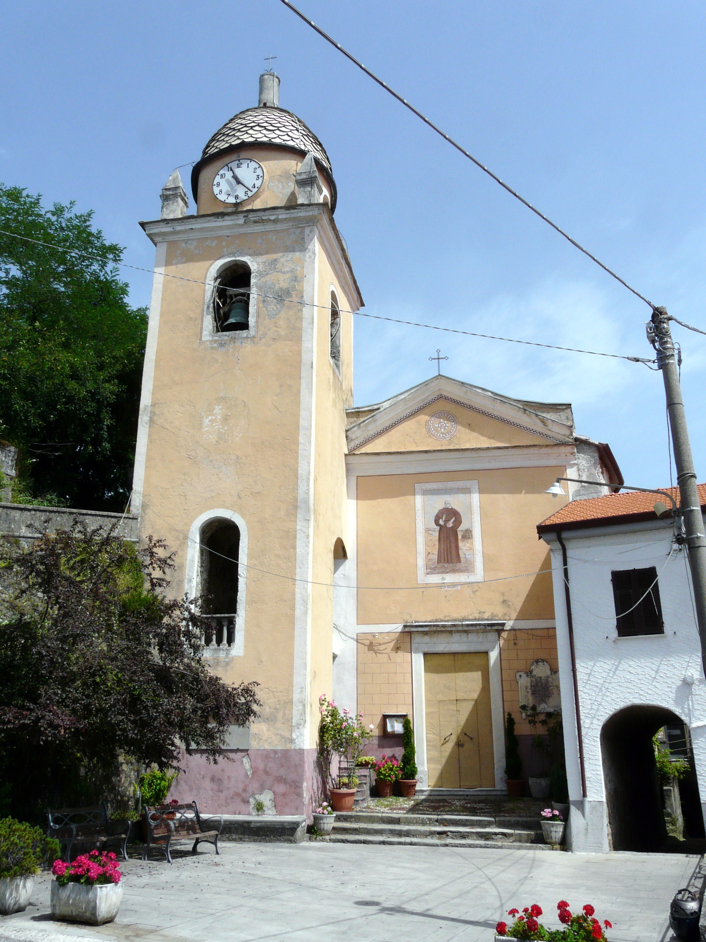 La chiesa di San Leonardo, Follo Alto, Follo, Liguria, Italia